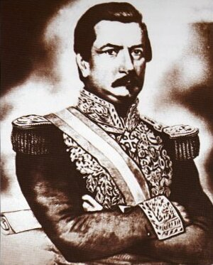 Imagen del general Gerardo Barrios, expresidente de El Salvador entre 1859-1863